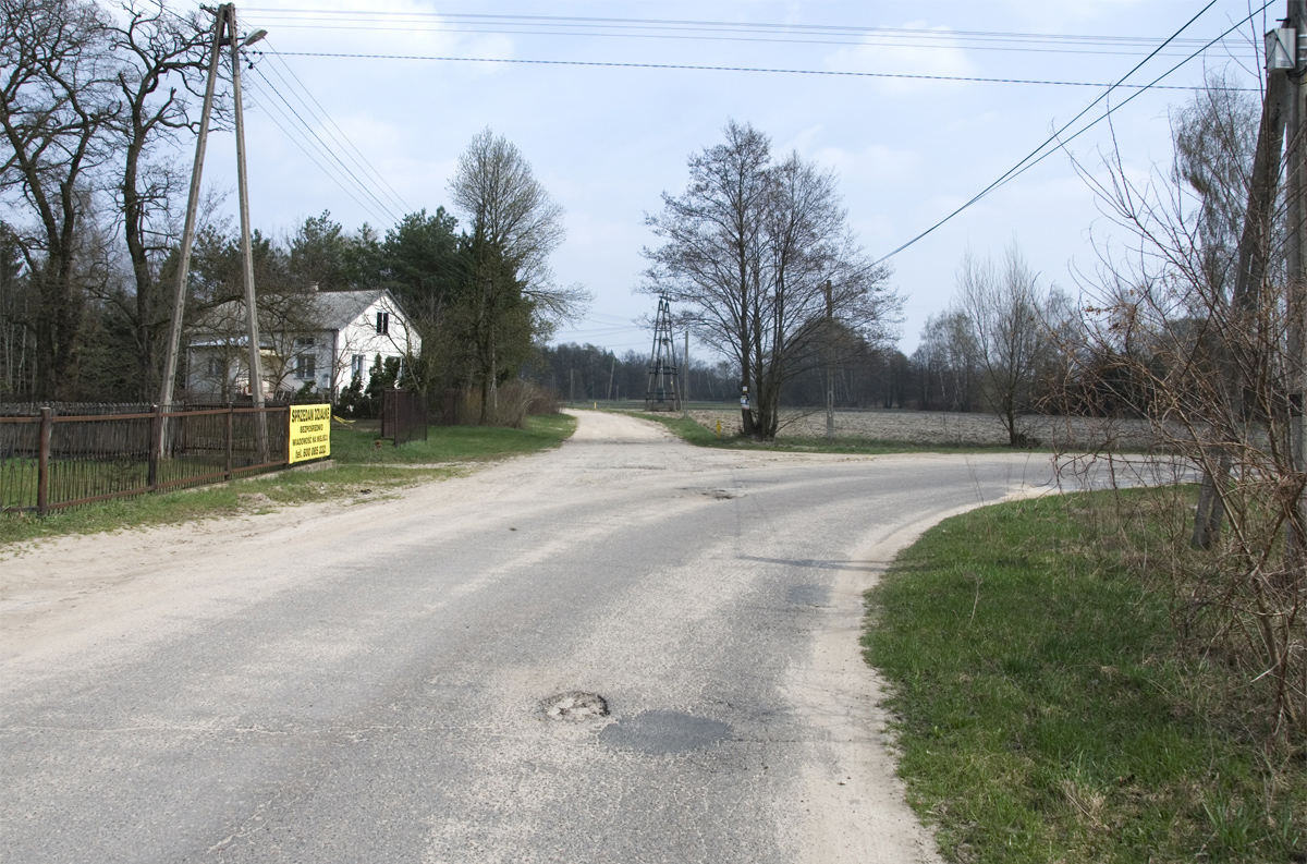 Wola Pieczyska